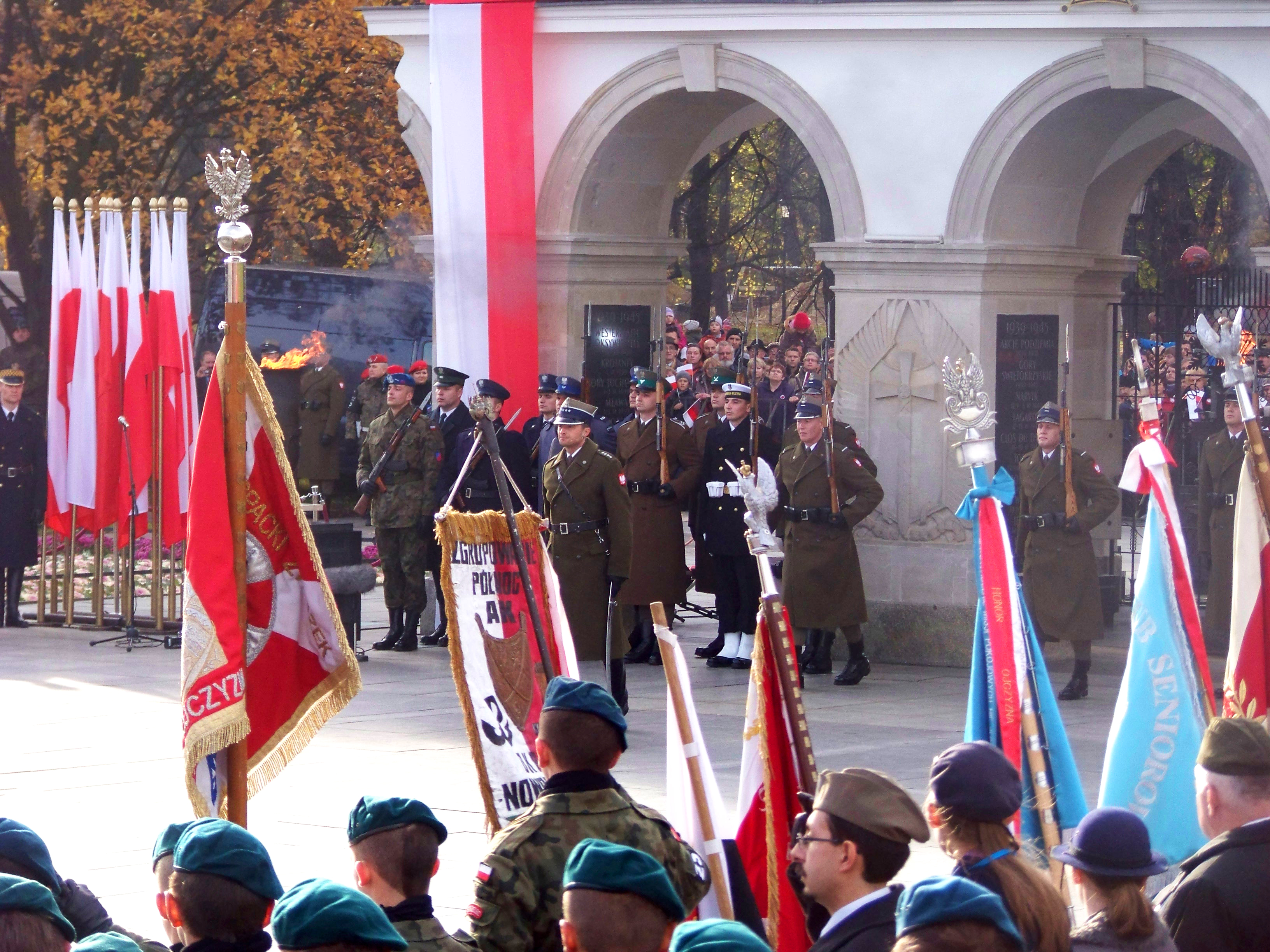 Święto Niepodległości